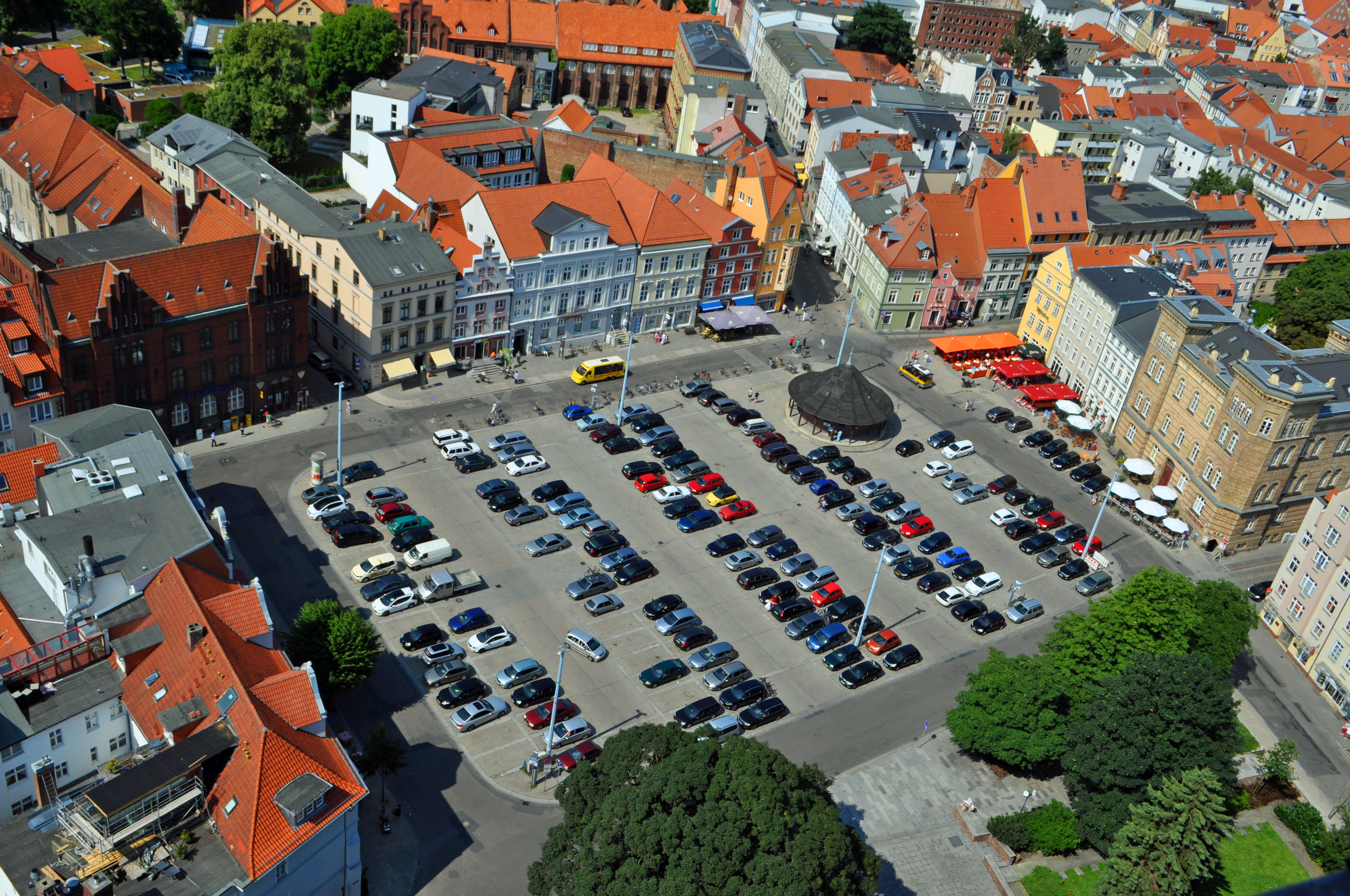 Fotografiert vom Turm der Marienkirche in Stralsund. Neuer Markt (Stralsund)